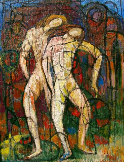 Tänzer (Doua personaje), George Stefanescu, Öl/Leinwand, 60x50 cm, (19)85, Privat Sammlung Dipl.Ing.Arch.Radu Stefanescu-Gross, Lüdinghausen, Deutschland.